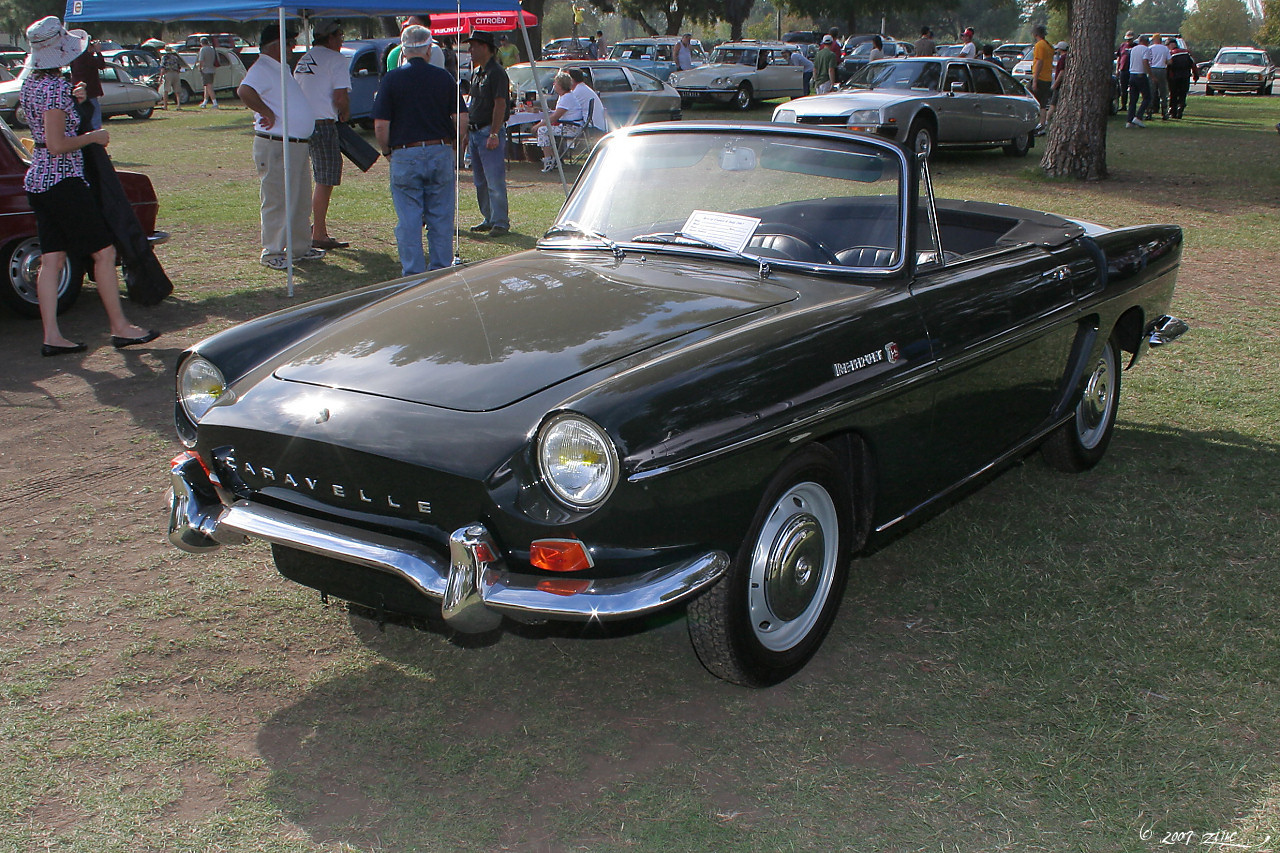 1967 Renault Caravelle cnv - fvl-1